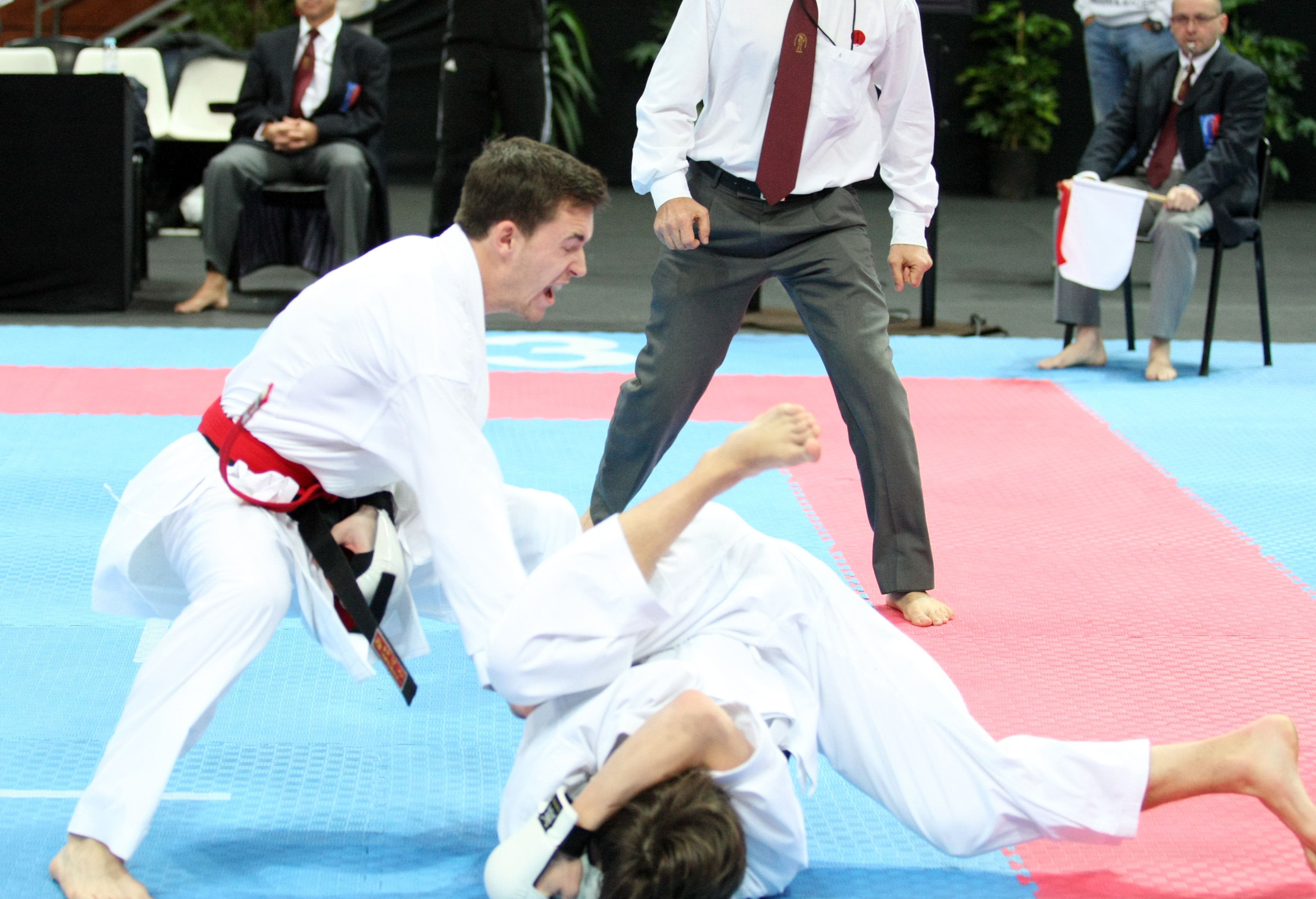 Patrick Urban Senior Male Individual Kumite